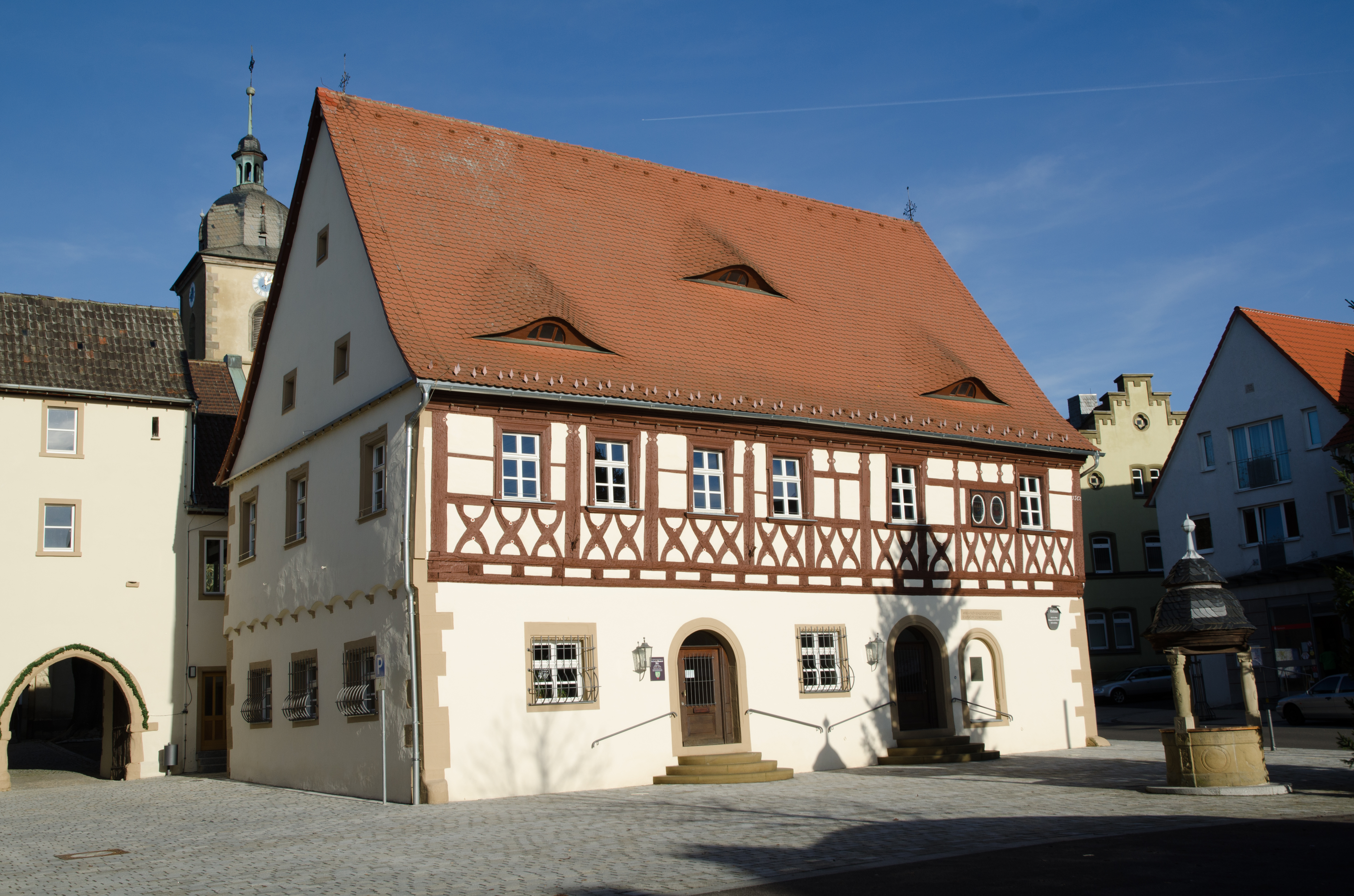 Gochsheim, Rathaus (rechts) und Zugang zum Kirchgaden (links)